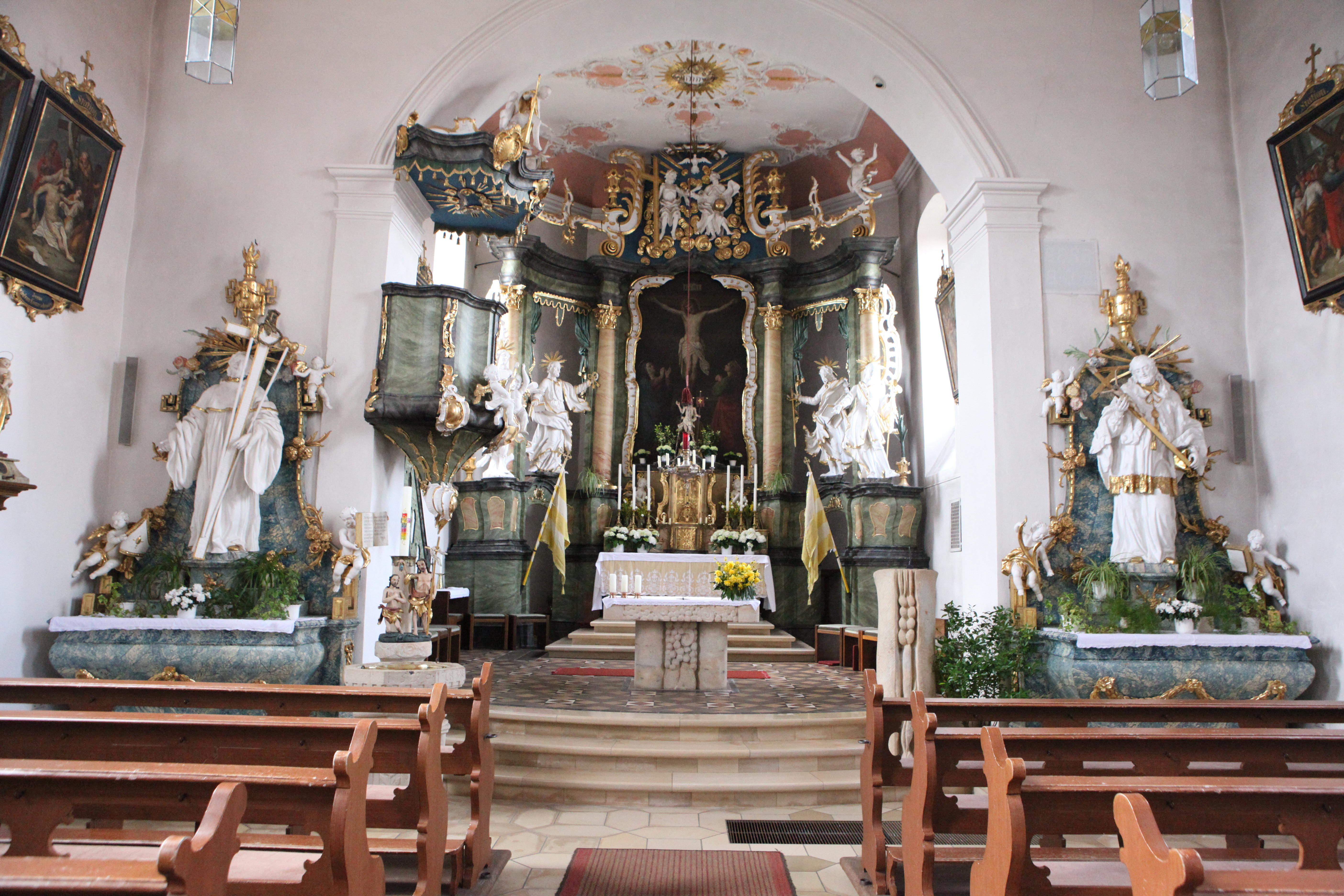 Autenhausen, St. Sebastian